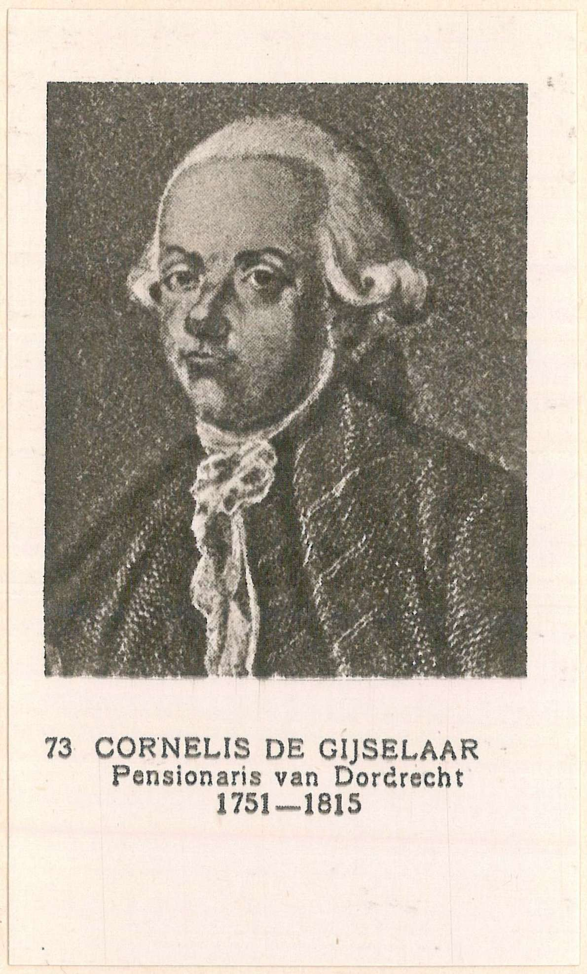 73 Cornelis de Gijselaar, Pensionaris van Dordrecht, 1751-1815. Vaderlandse Historie 2 (1926)